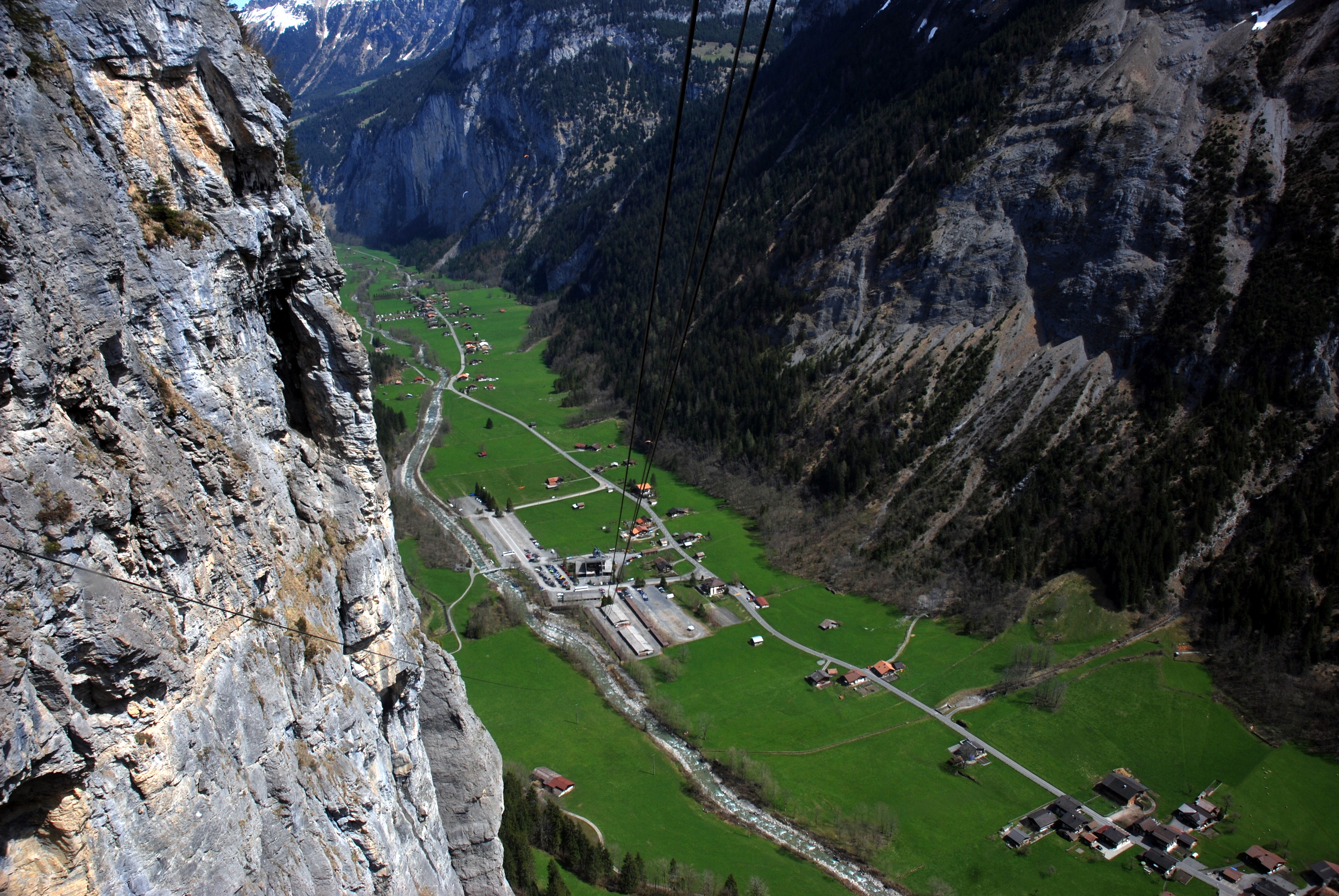 Lauterbrunnen